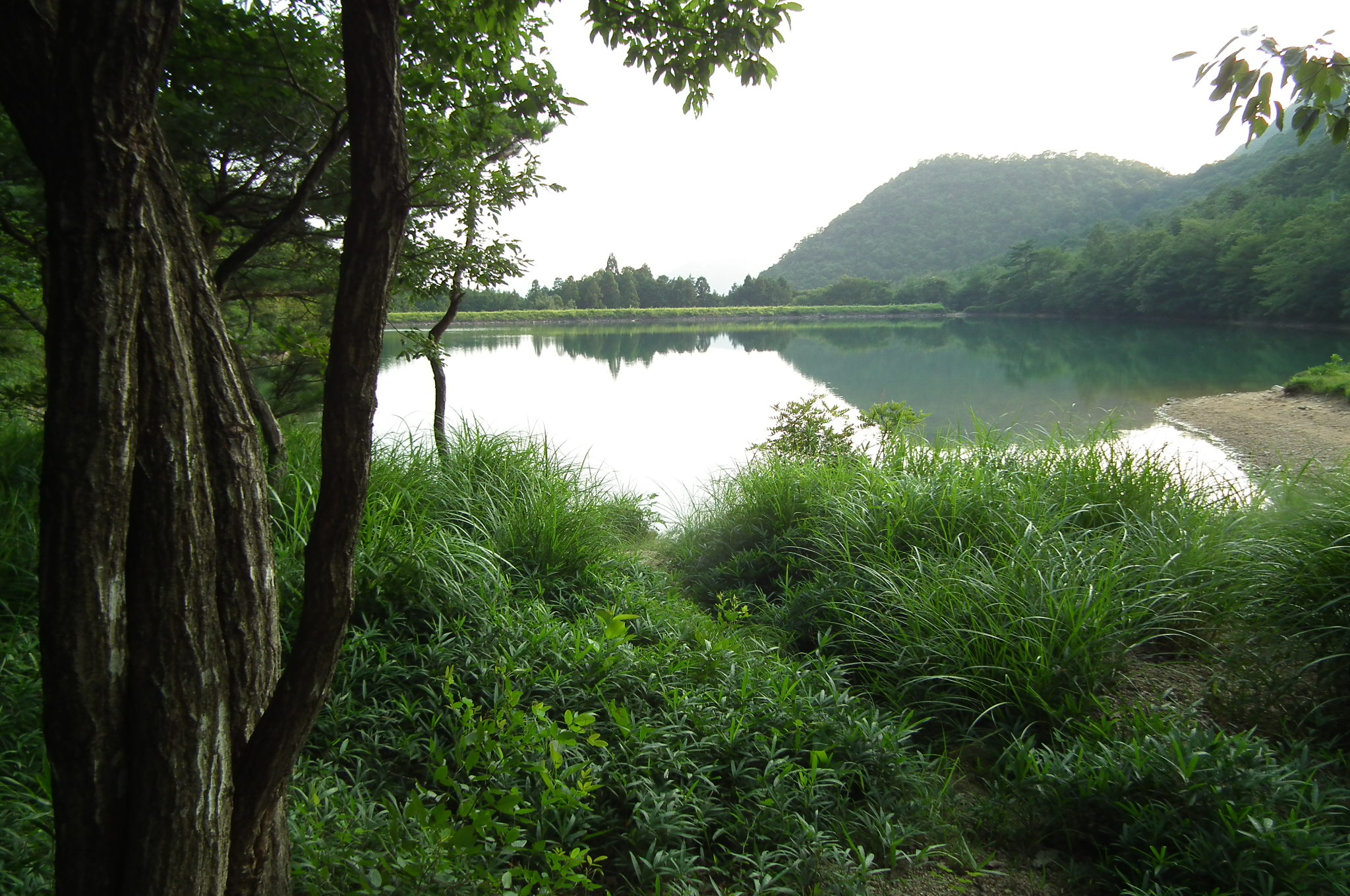 Akitani Pond Grave of the Fireflies 秋谷池（兵庫県西脇市黒田庄町喜多字秋谷口） 『火垂るの墓』実写映画版 ロケ地